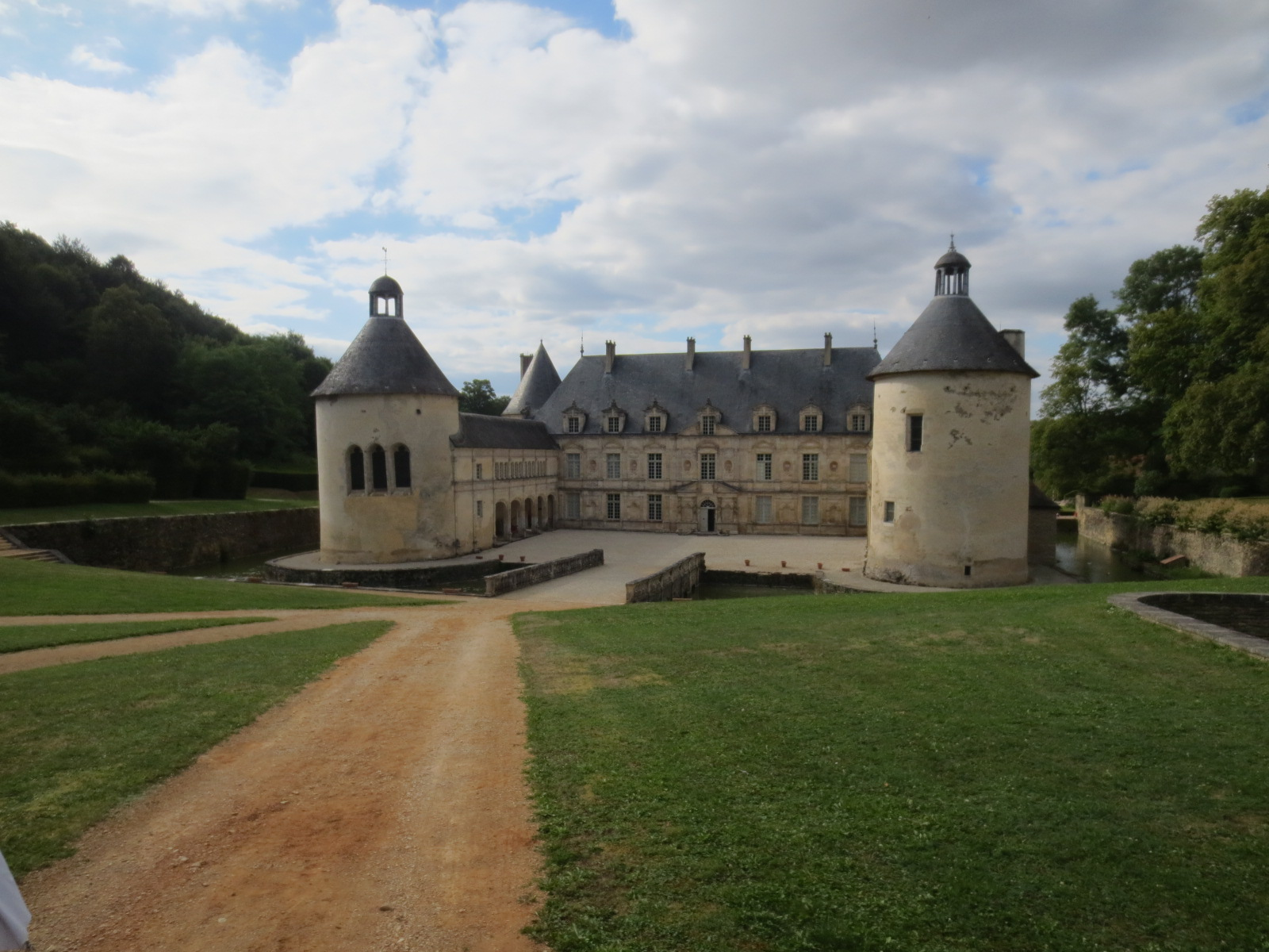 Château de Bussy-Rabutin